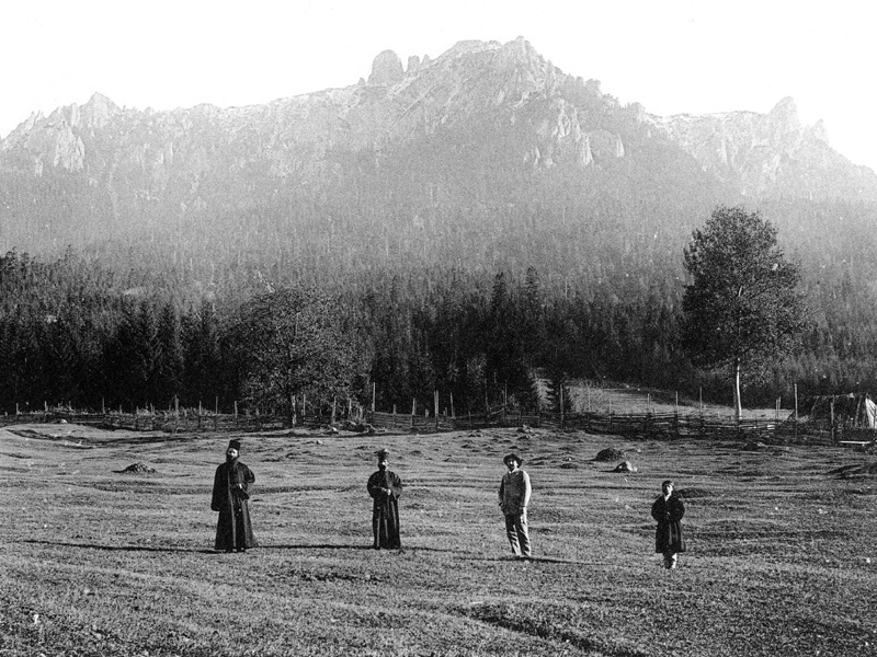 Ceahlău, Neamţ